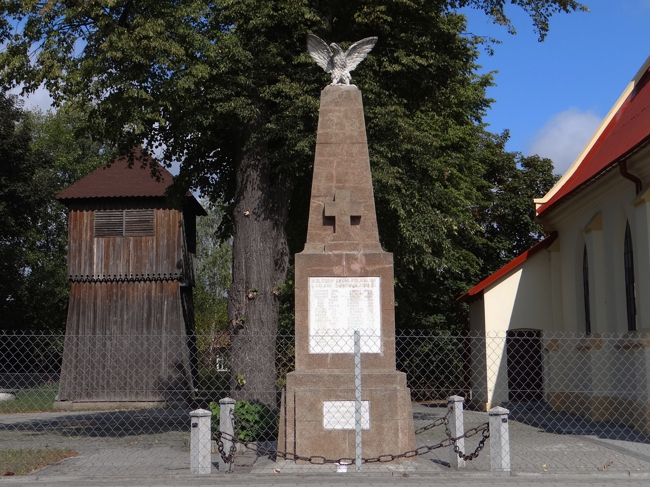 Pomnik ofiar I wojny światowej w Łętowicach